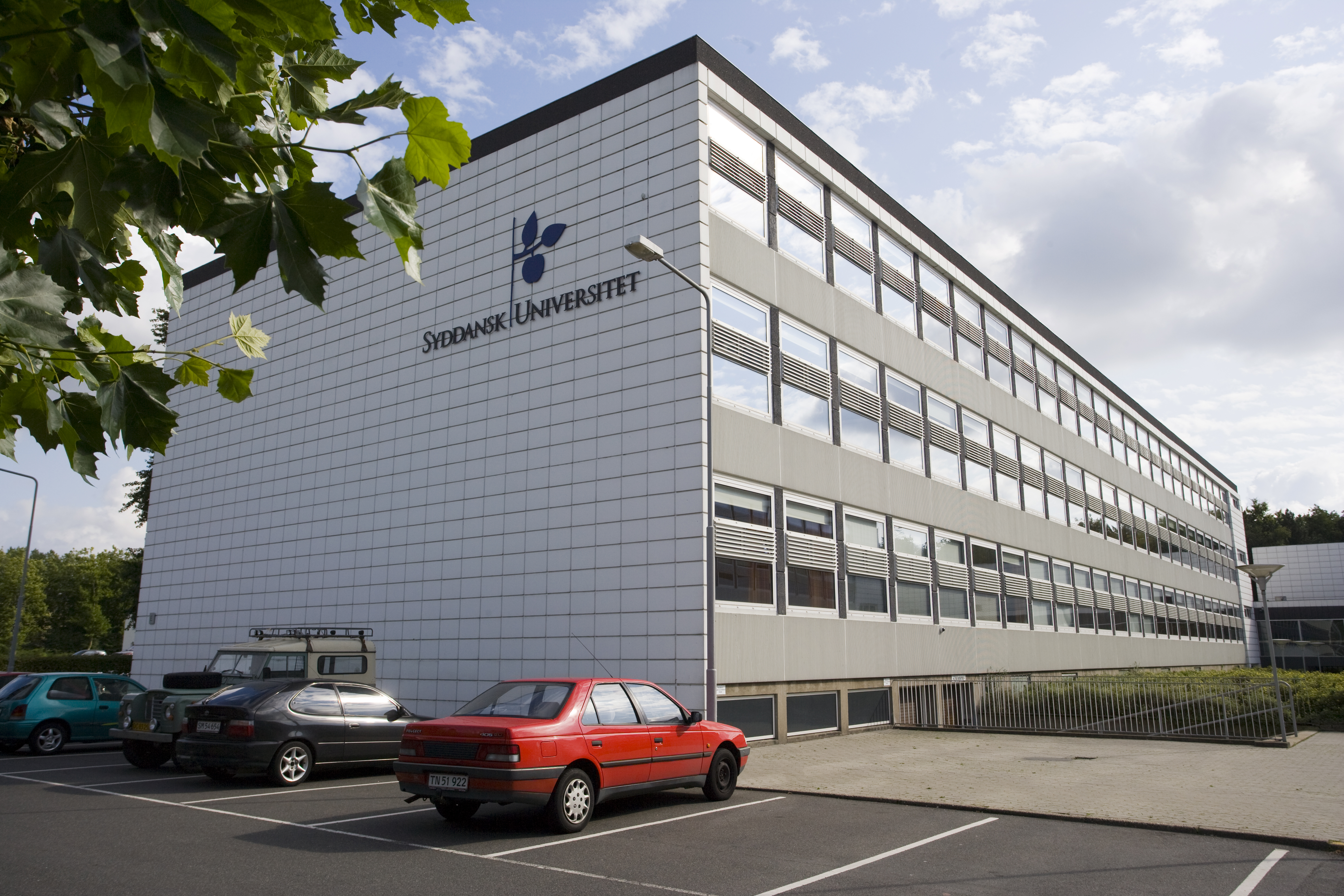 Billede af Det Tekniske Fakultet, Syddansk Universitet.